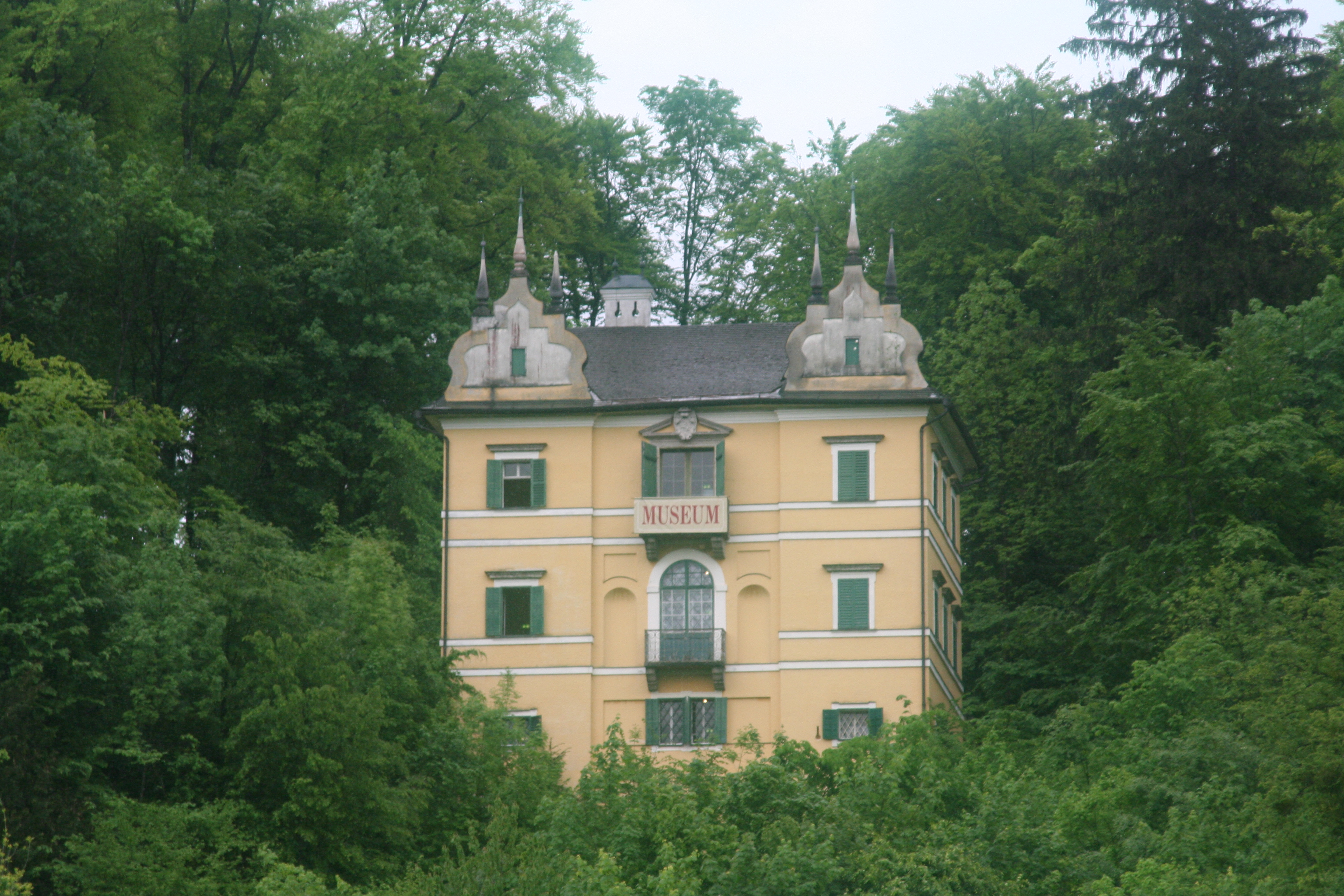 Das Monatsschlössl liegt auf dem Hellbrunner Berg im Bereich des Schlosses Hellbrunn und ist mit diesem unter der GstNr. 986 / KG Morzg denkmalgeschützt.